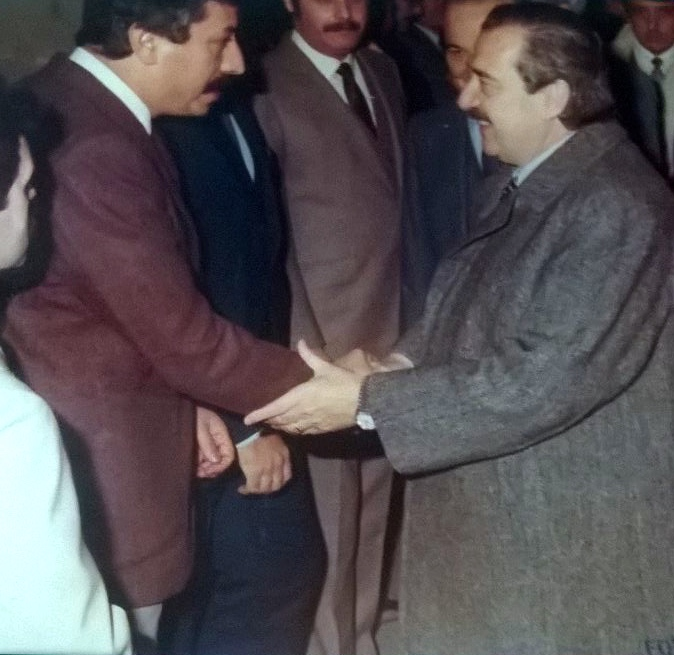 El Secretario de Salud del Chubut Luis García es recibido por el Presidente Raúl Alfonsín